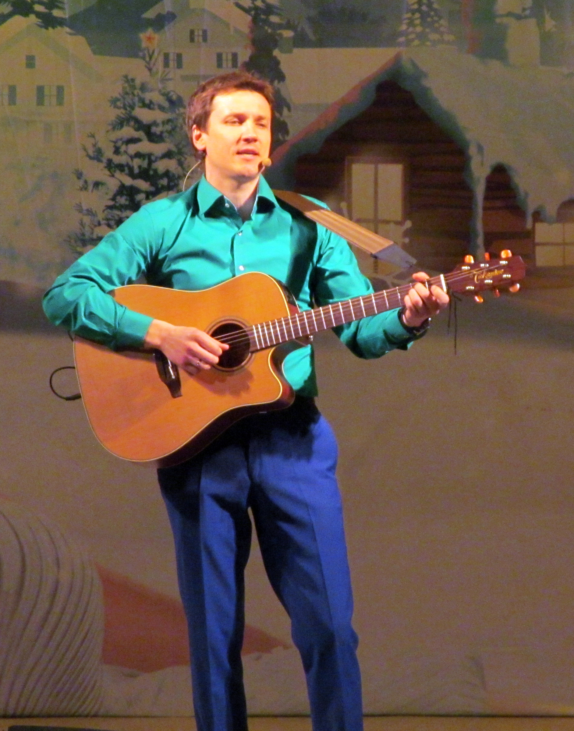 Вячеслав Мясников на концерте Уральских пельменей, в Пермском дворце культуры имени Солдатова. 15 января 2015 года.